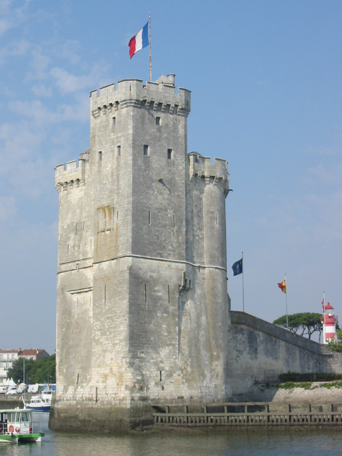 Tour Saint-Nicolas, La Rochelle, France